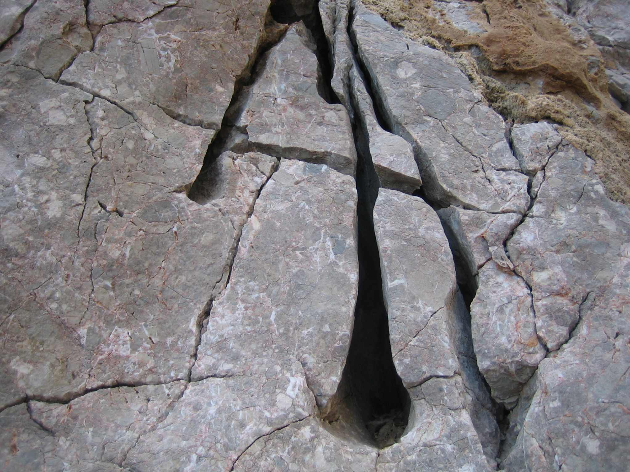 Karre (Rinne) im kroatischen Karst.